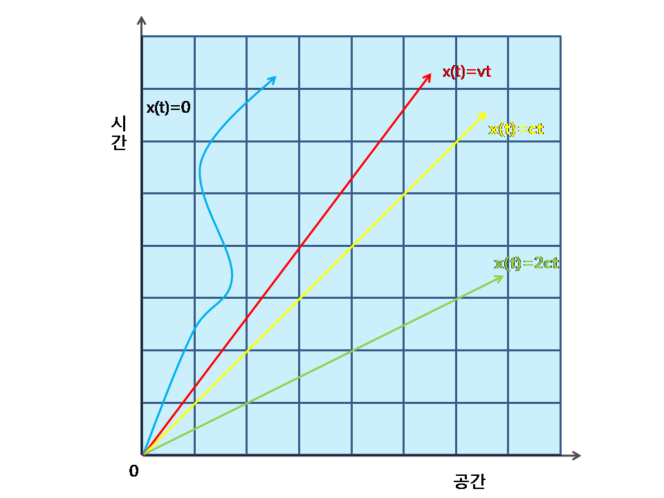 다양한 세계선의 그래프입니다.